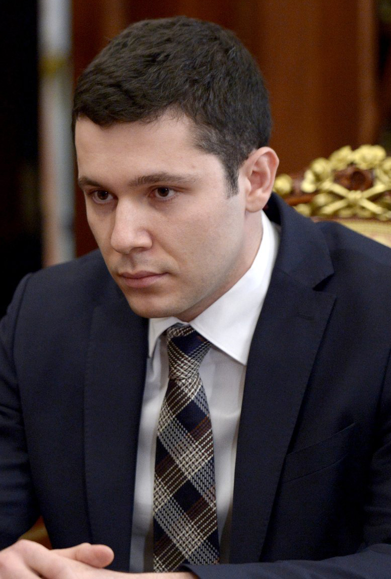 Временно исполняющий обязанности губернатора Калининградской области Антон Алиханов